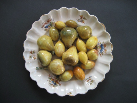 Colección de Loza del Museo de Cerámica de l'Alcora. Plato de engaño s. XVIII